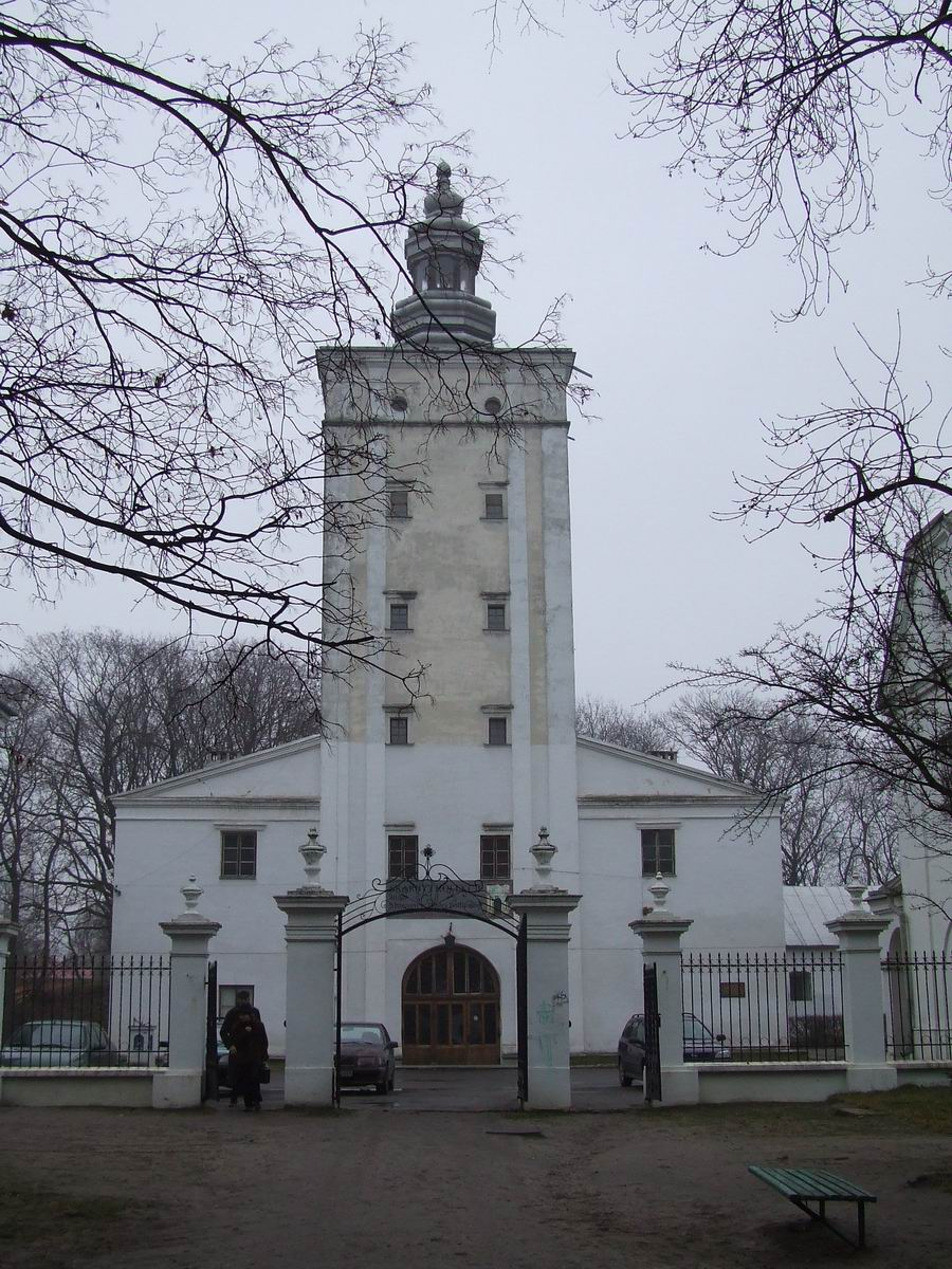 Biała Podlaska, wieża zamkowa - Muzeum Okręgowe